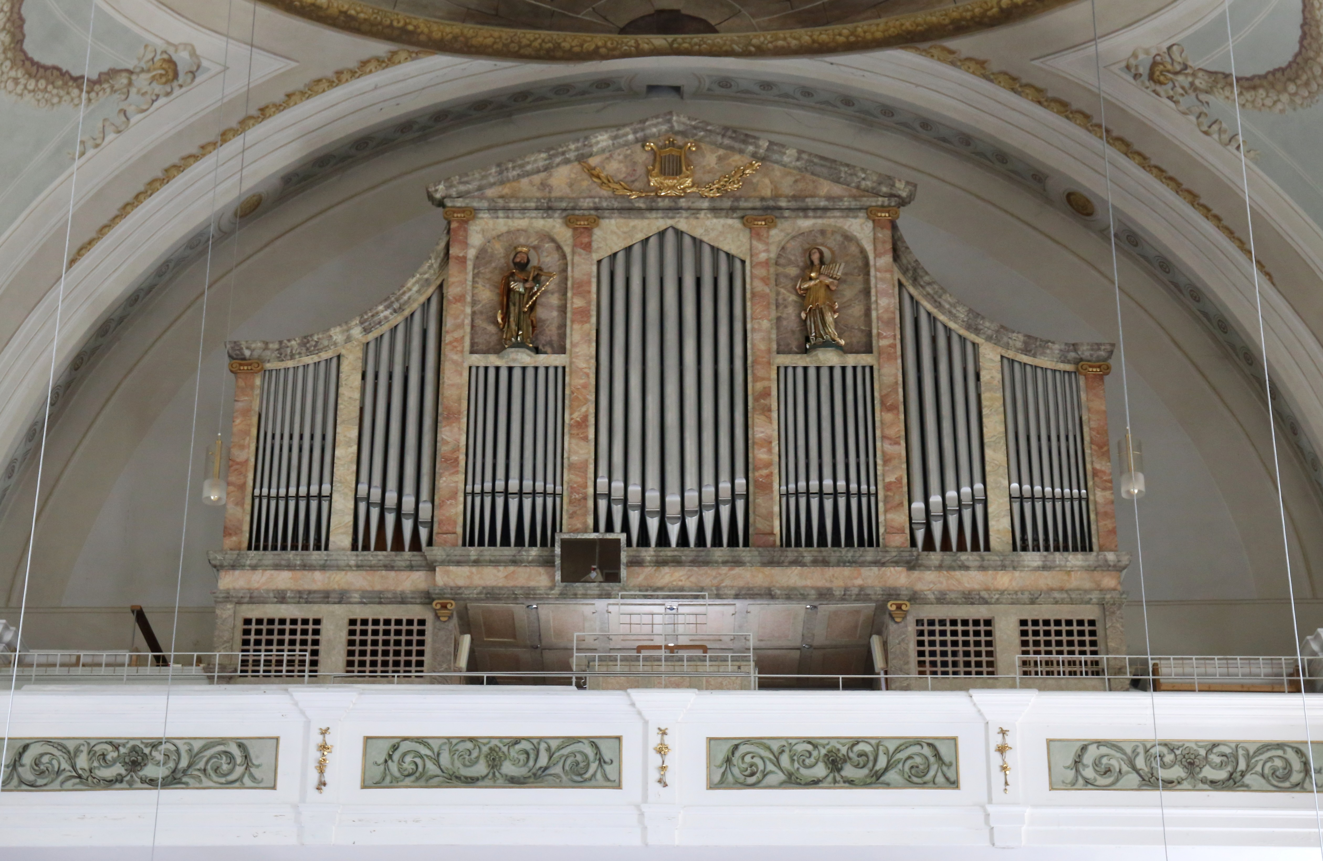 Kath. Pfarrkirche hl. Petrus, Reith im Alpbachtal; mächtiger klassizistischer Saalbau. Urkundlich Pfarre 1187. Kirchenneubau 1801 bis 1805 This media shows the remarkable cultural object in the Austrian state of Tyrol listed by the Tyrolean Art Cadastre with the ID 3503. (on tirisMaps, pdf, more images on Commons)